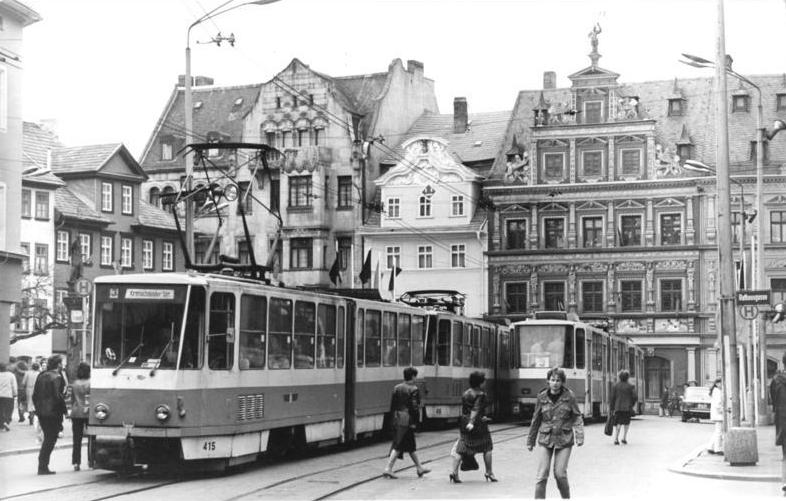 ADN-ZB-Ludwig-13.5.1983-Erfurt: 100 Jahre Straßenbahn- Seit am 13.5.1883 der Straßenbahnverkehr aufgenommen wurde, hat er sich grundlegend gewandelt. Heute bestimmen leistungsfähige Tatra-Züge auch am historischen Fischmarkt das Bild.